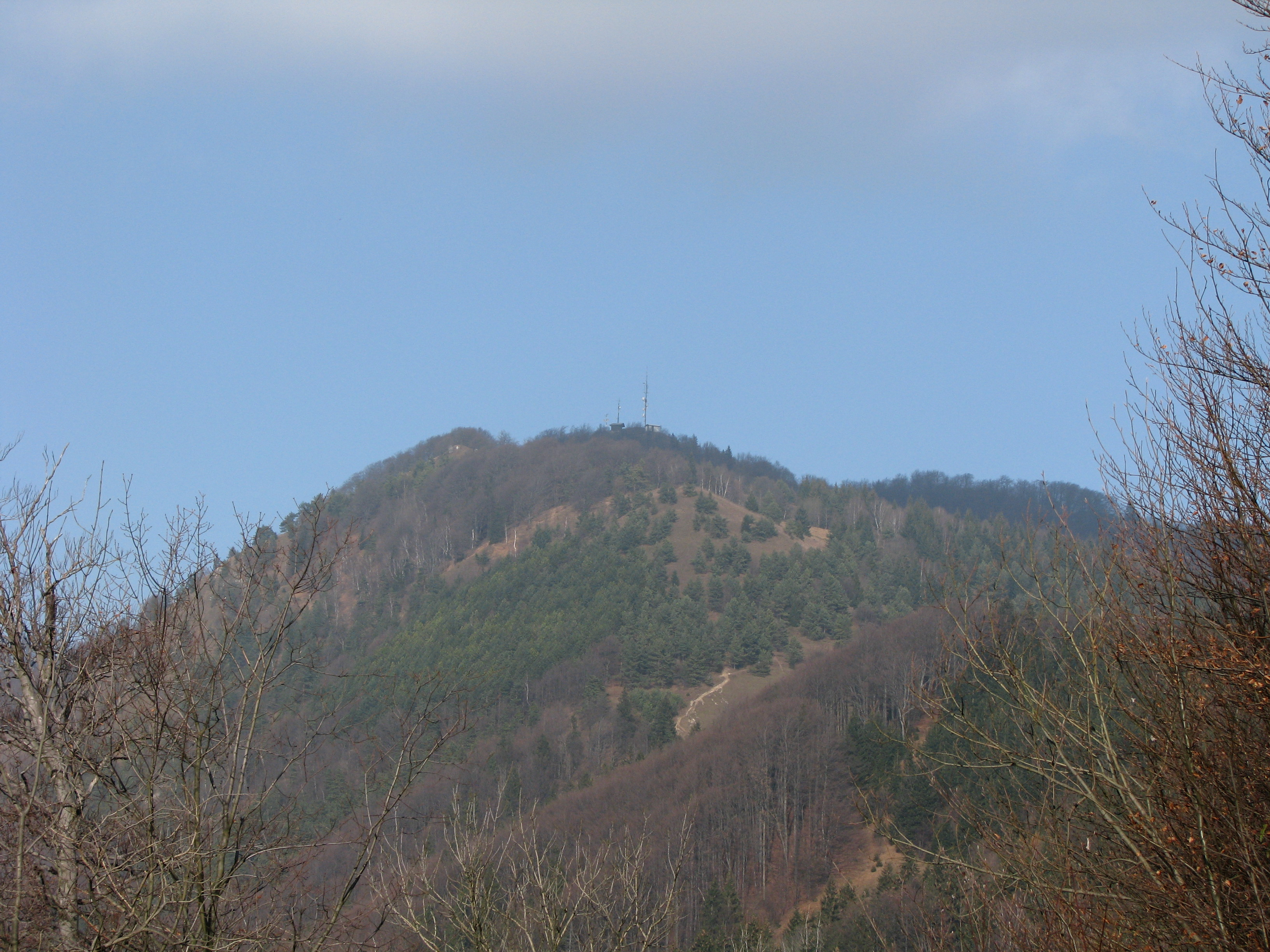 Mrzlica (1122 m), pogled z jugovzhoda. Na vrhu je oddajnik, spodaj, pod iglastim gozdom, je vidna pot s trboveljske strani (iz Kala)